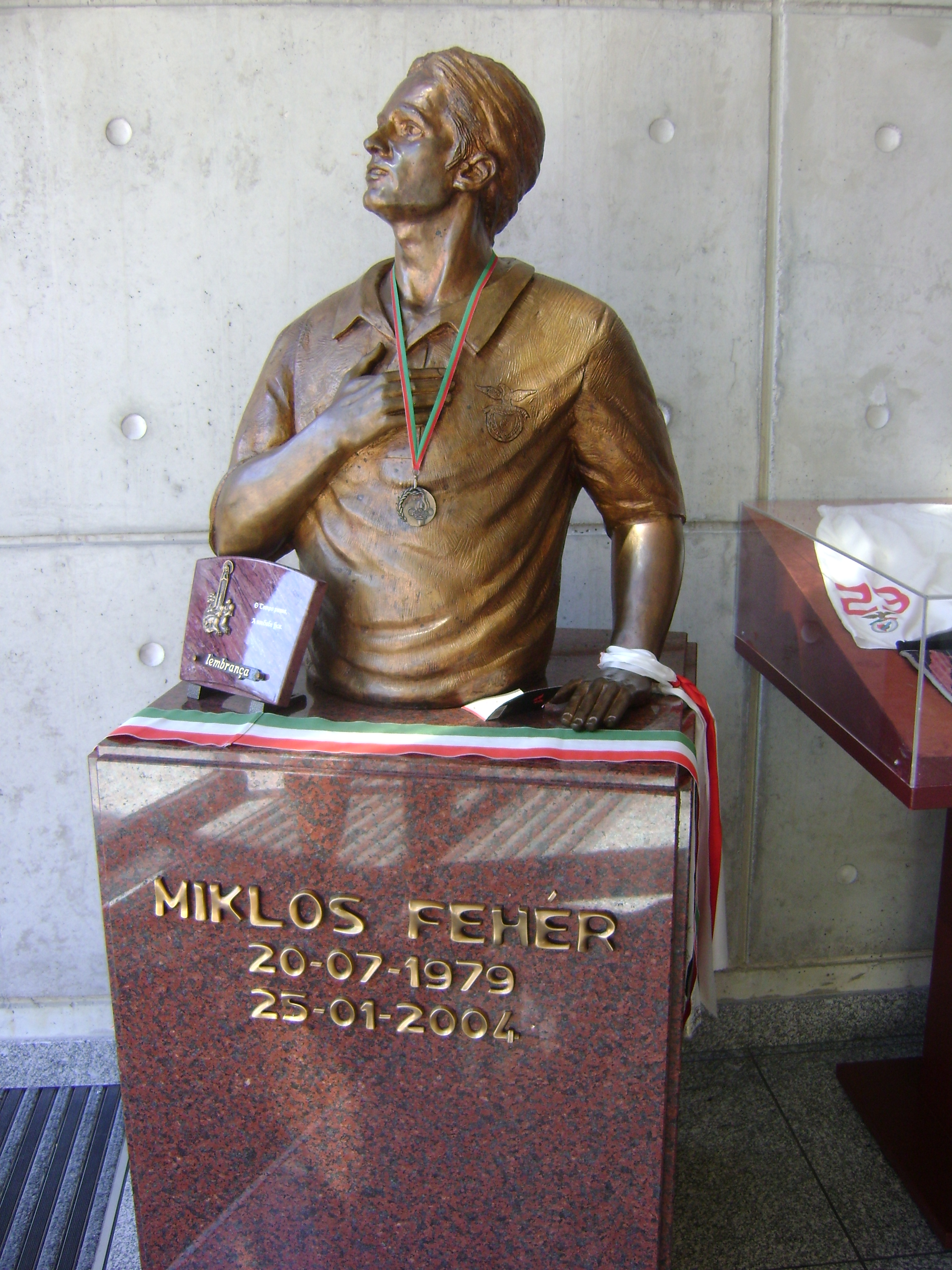 Miklós Fehér memorial